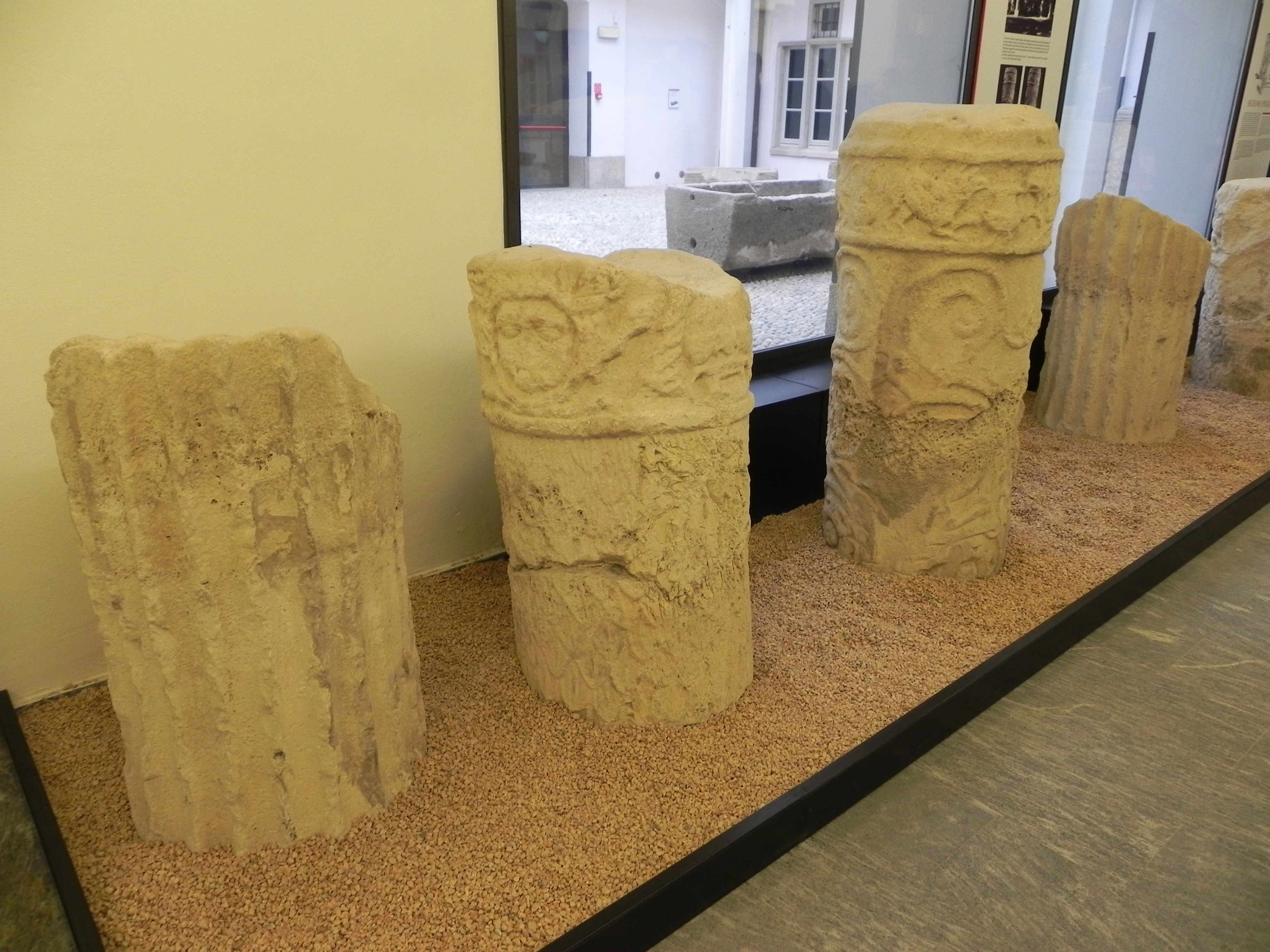 i ritrovamenti delle 6 colonne di Angera